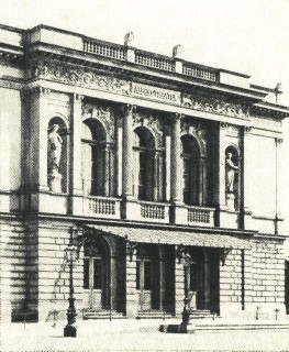 Das Alberttheater am Albertplatz in Dresden 1875